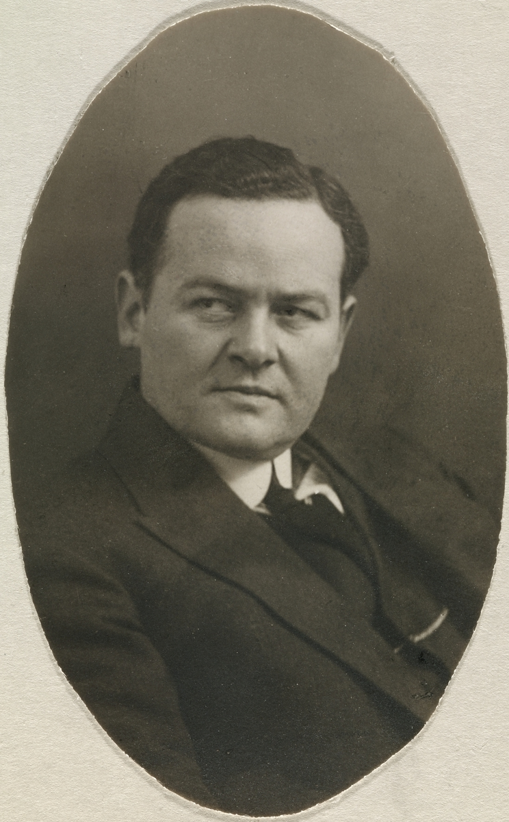 Karl Meyer (1888-1964)